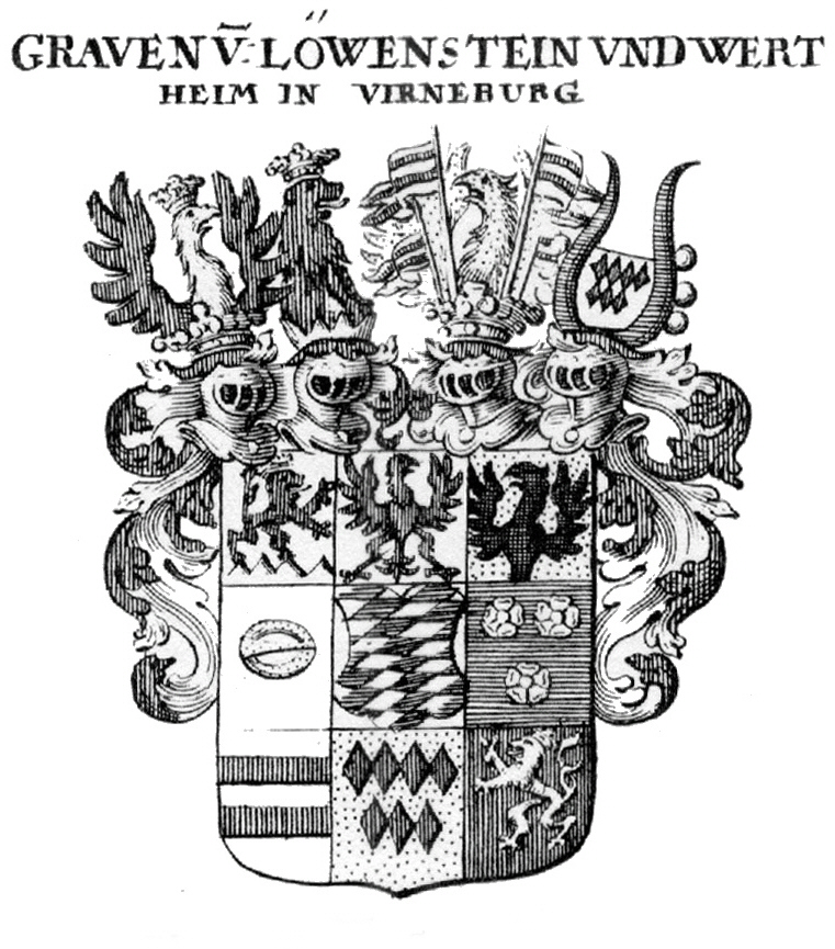 Wappen der europäischen Adelsfamilie Löwenstein-Wertheim-Virneburg - Grafen und Fürsten des Heiligen Römischen Reiches